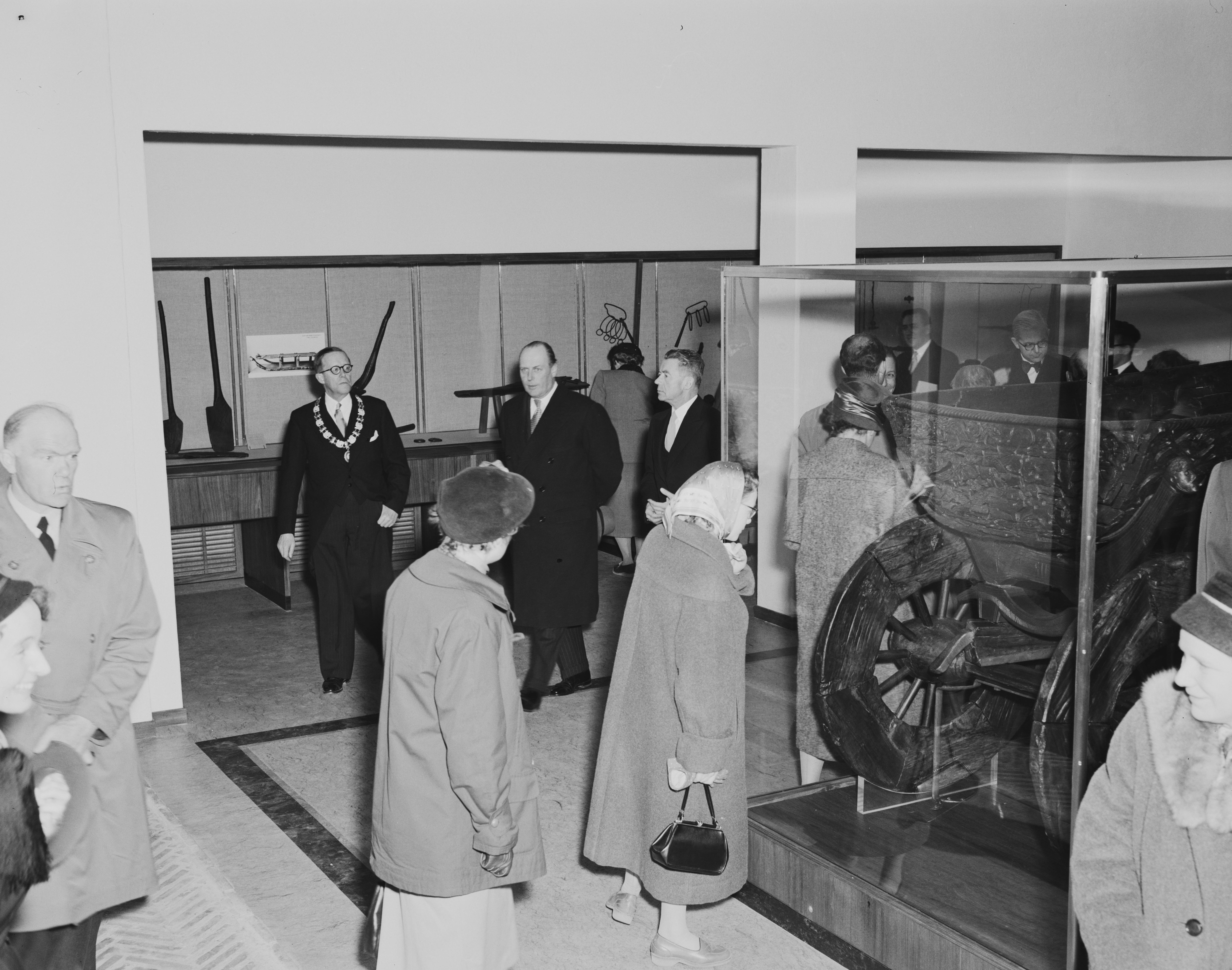 Bildet er hentet fra Nasjonalbibliotekets bildesamling Bygdøy,Oslo, Oslo, Oslo Depicted person: Brun, Jac